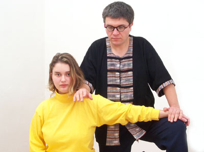 Zpracovávání svalstva kombinuje současné protahování a tlak různými částmi těla.)